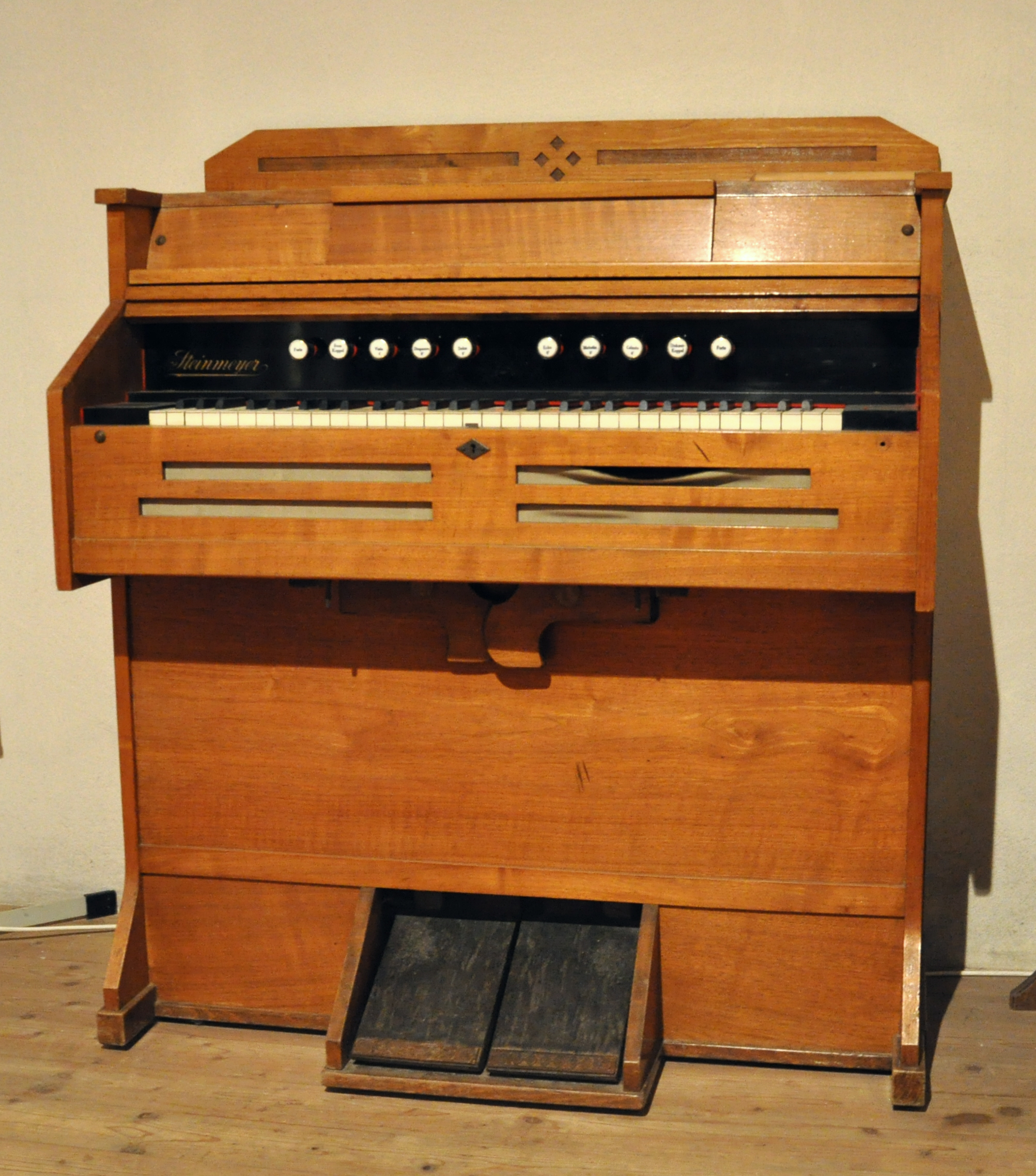 Memmingen, Kirche Unser Frauen, Steinmeyer-Harmonium